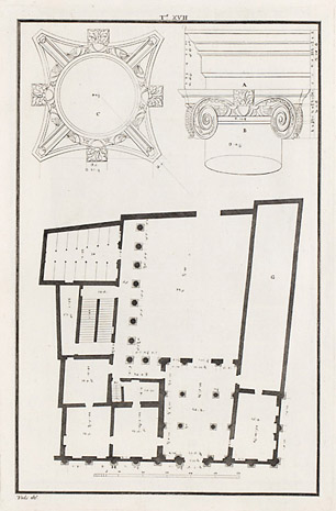 Palazzo Barbaran da Porto di Andrea Palladio. Disegno da Ottavio Bertotti Scamozzi, 1776